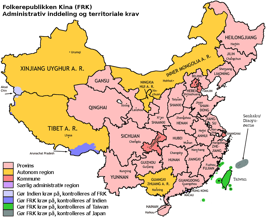 Folkerepublikken kina med danske tekster